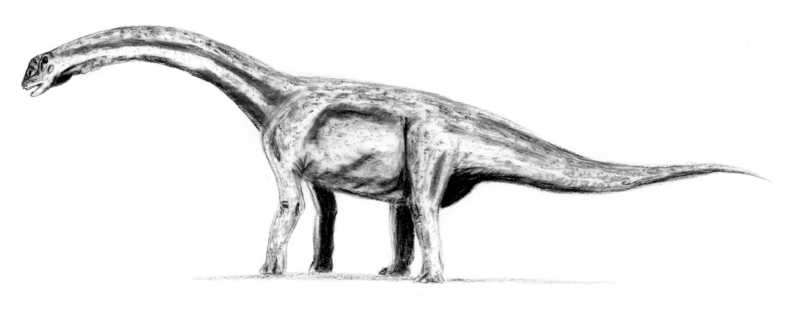 Paralititan, pencil drawing